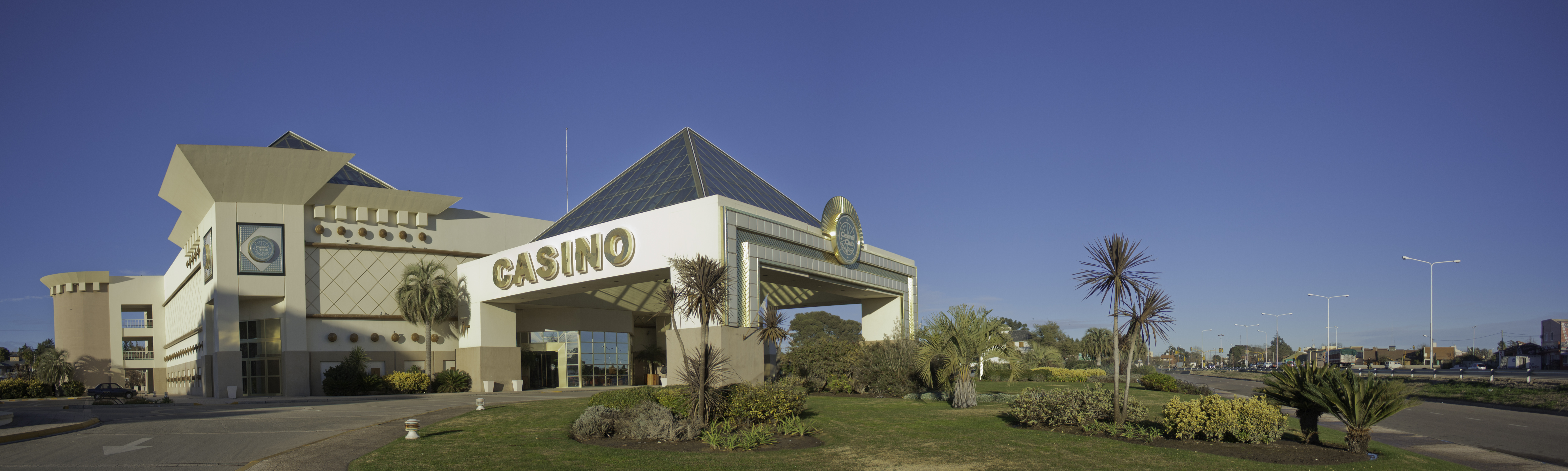 Casino Club, Santa Rosa, La Pampa Province, Argentina.